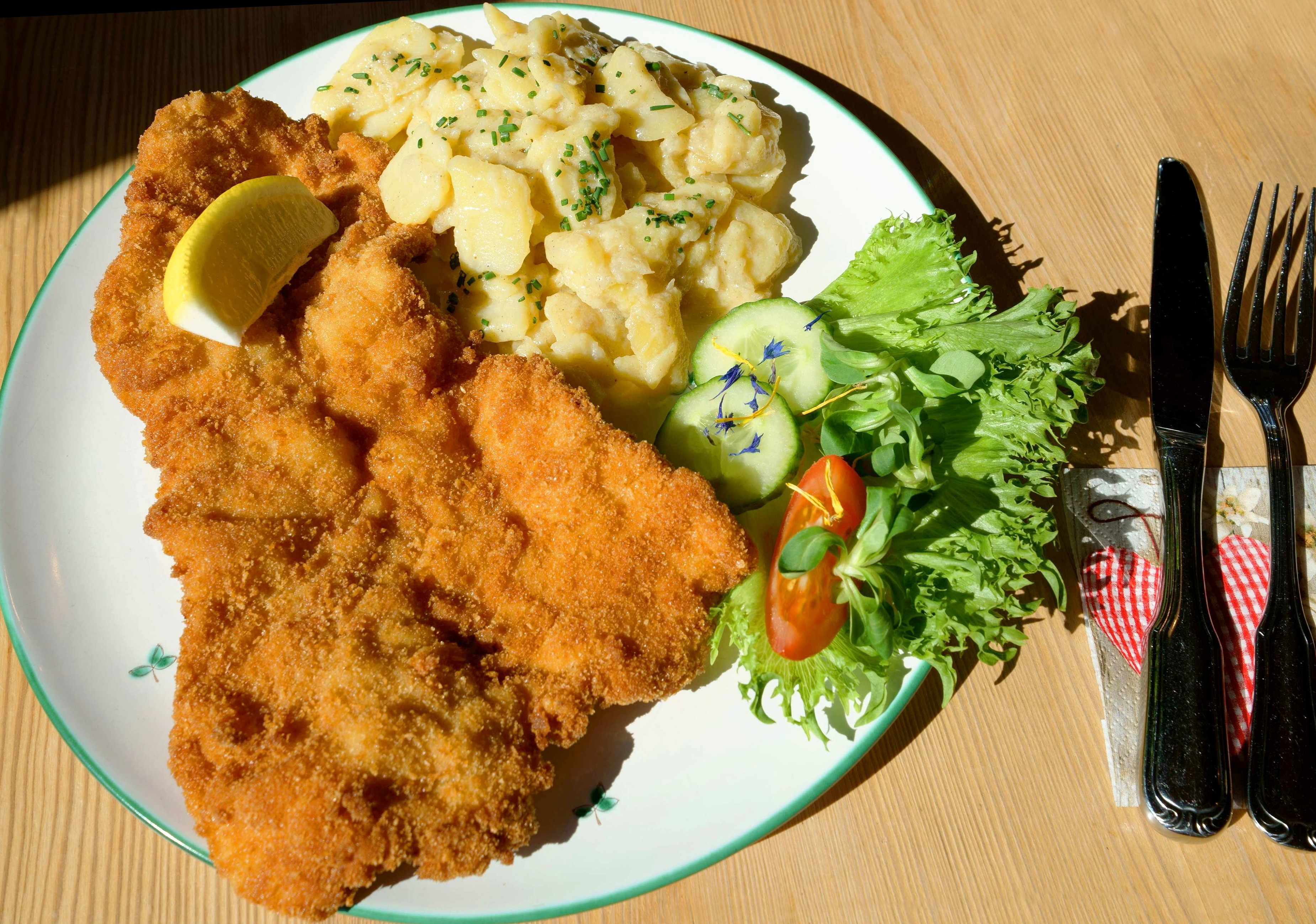 Original Wiener Schnitzel mit Kartoffelsallat